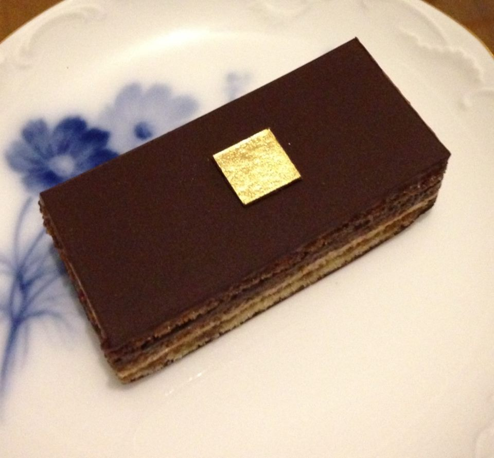 日本のオペラ